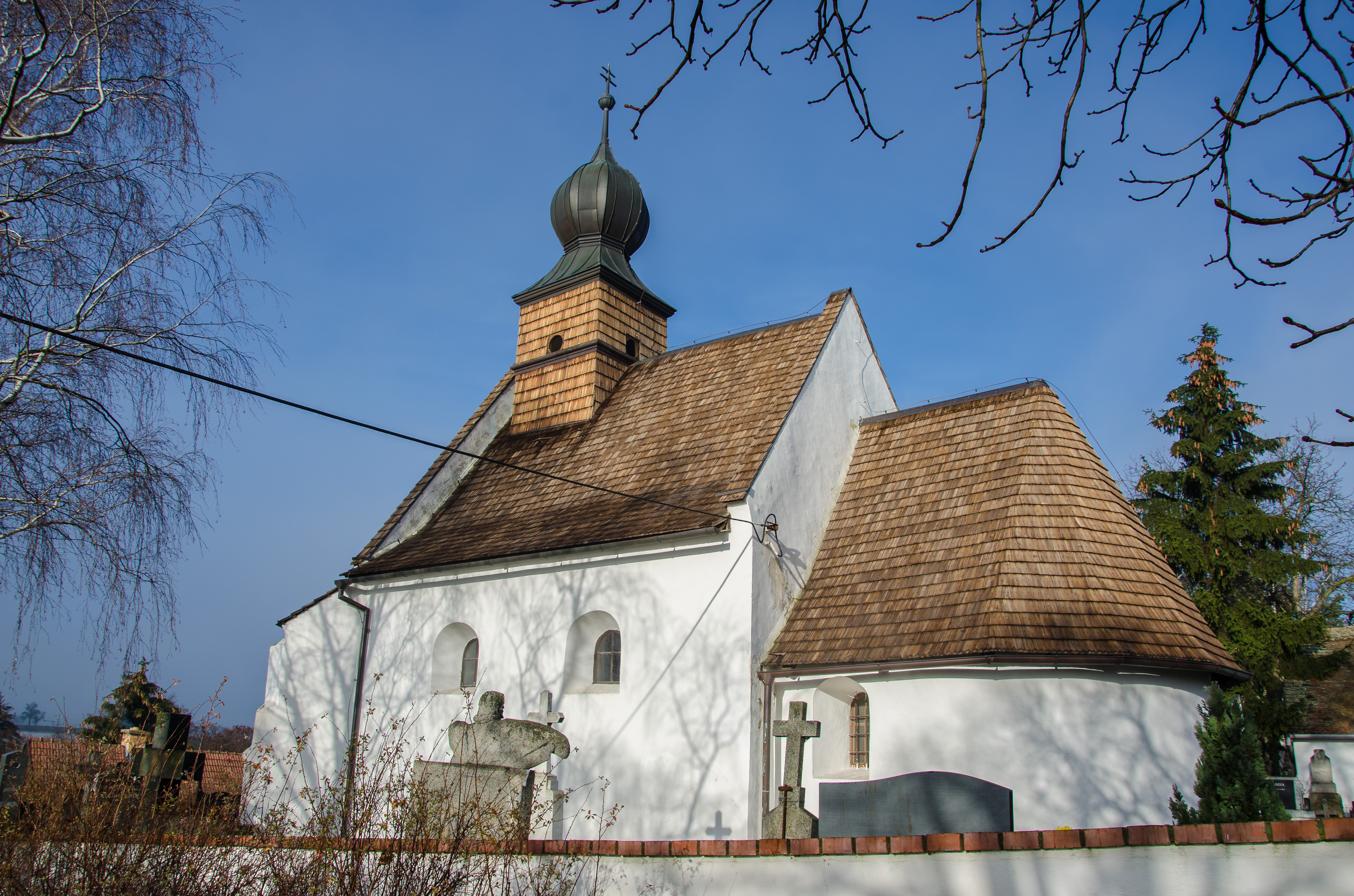 Kostel Všech svatých v obci Přeskače.